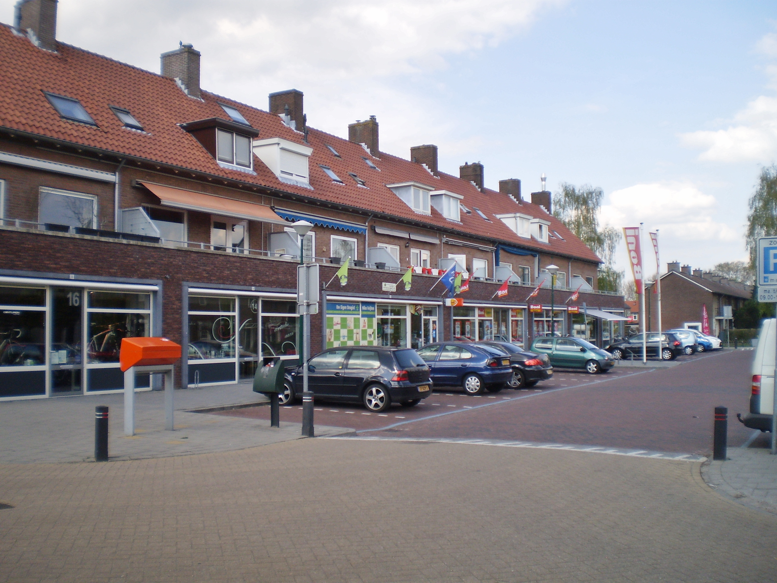 Baarn Oosterhei winkelcentrum Reigerstraat